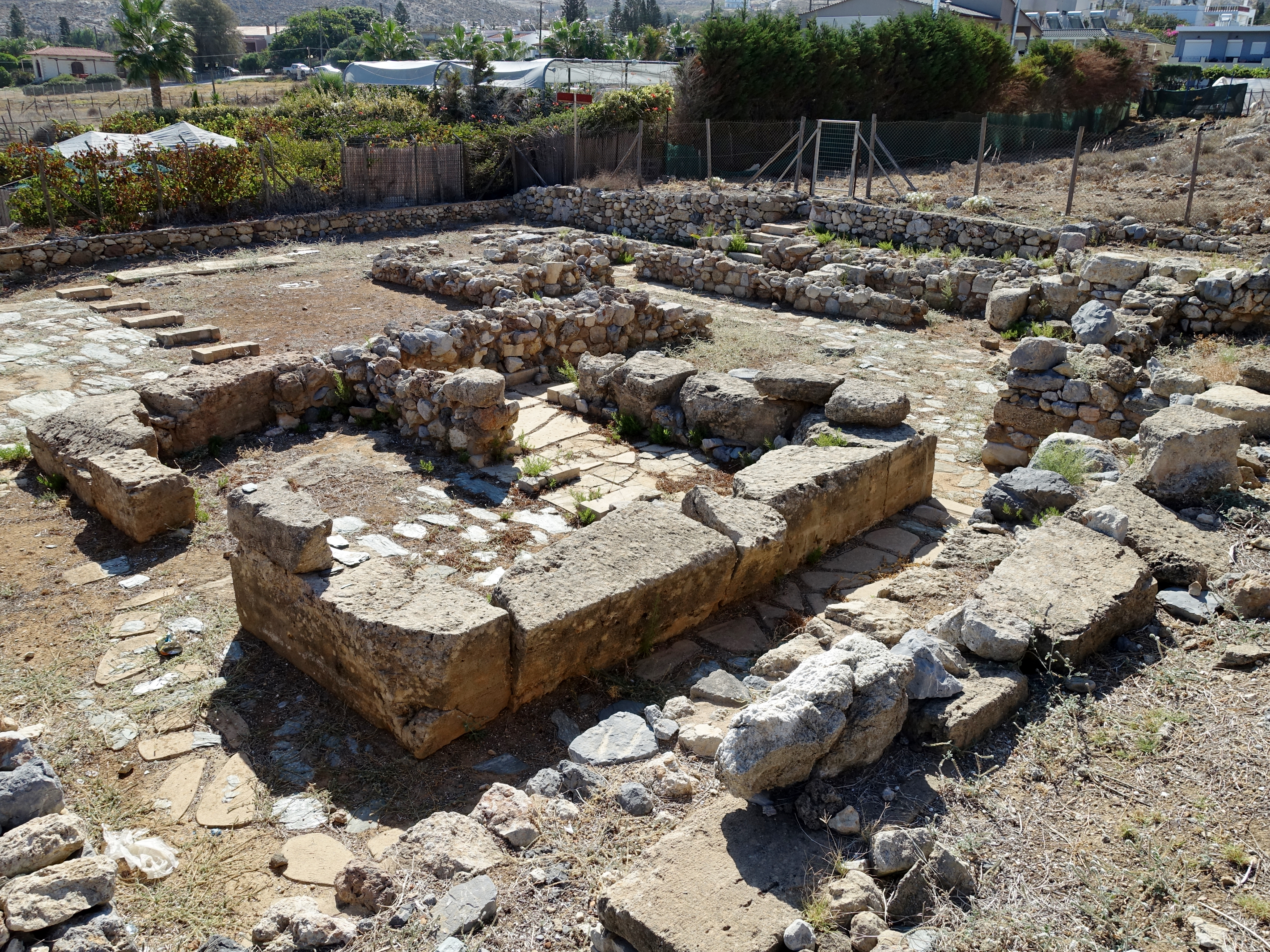 Minoische „Villa der Lilien“ in Amnissos bei Iraklio, Kreta, Griechenland